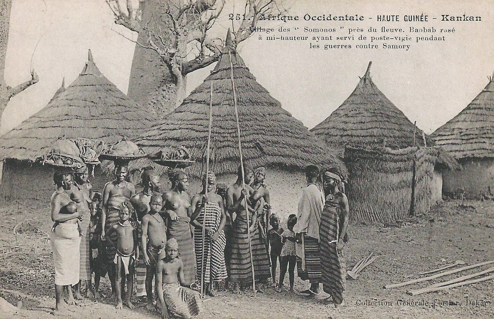 François-Edmond Fortier, Kankan. Village des Somonos près du fleuve. Afrique Occidentale. Haute-Guinée